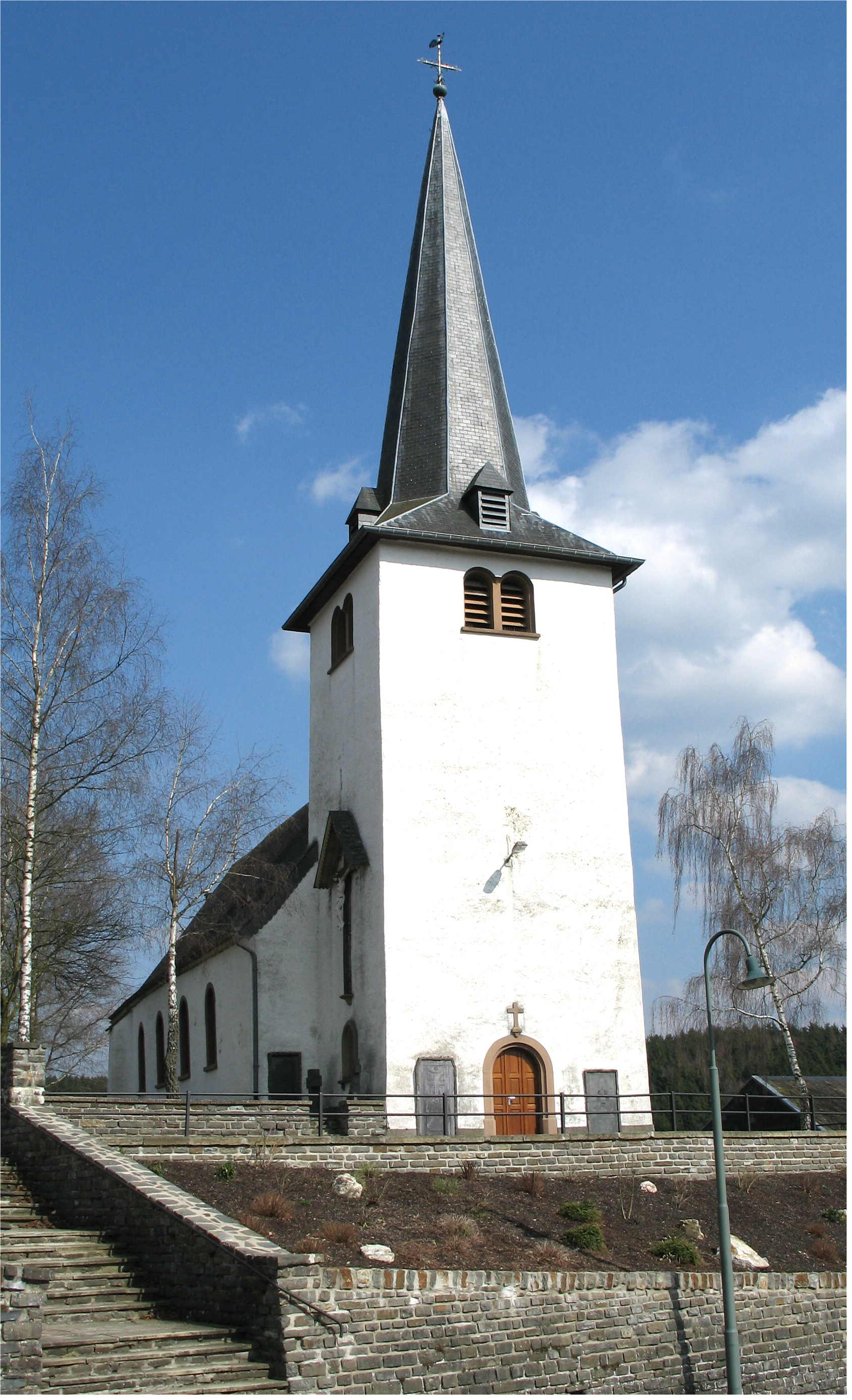 Kierch vu Béigen (Abrëll 2006) Kategorie:Gemeng Wëntger Beigen